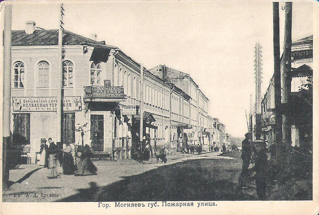 Беларуская (тарашкевіца): Магілёў (Mahiloŭ), завулак Пажарны (zavułak Pažarny) каля скрыжаваньня з вуліцай Ветранай (vulica Vietranaja). Памылковы подпіс